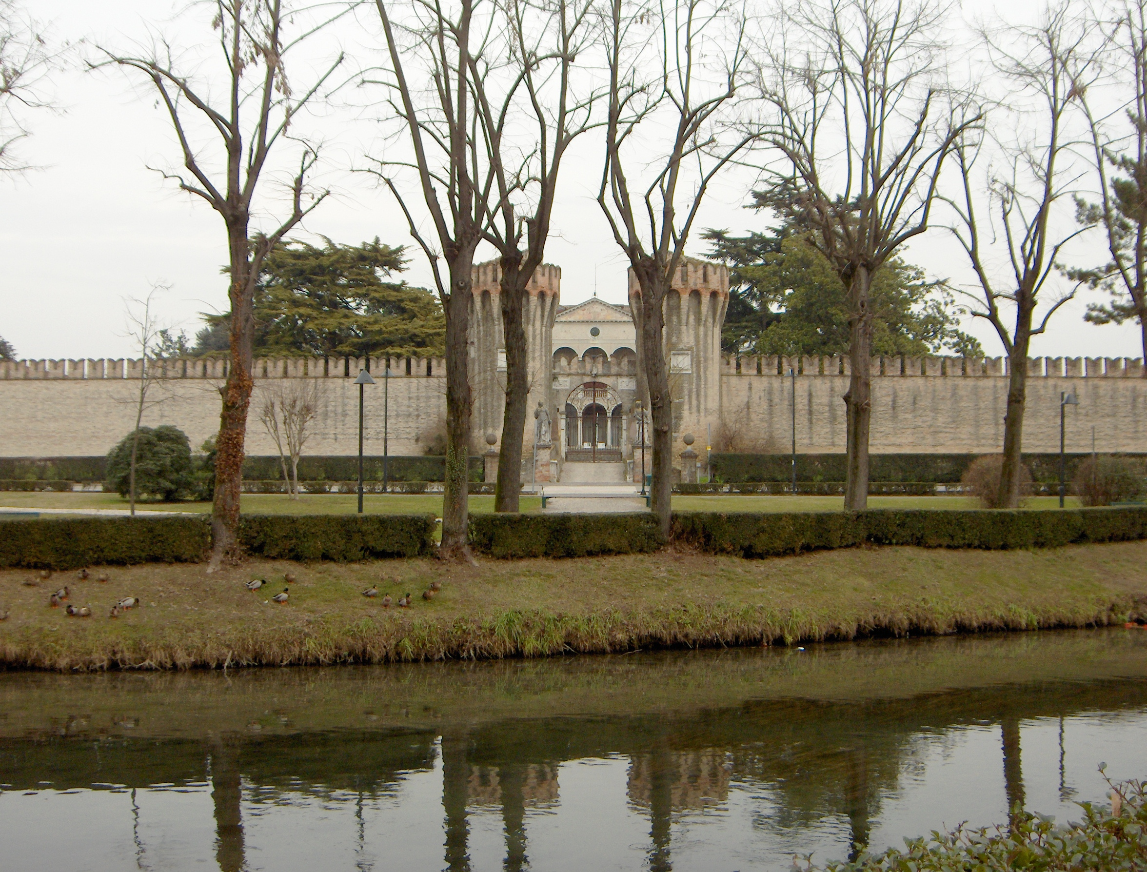 Veduta su Villa Giustiniani, Roncade, Treviso, Italy